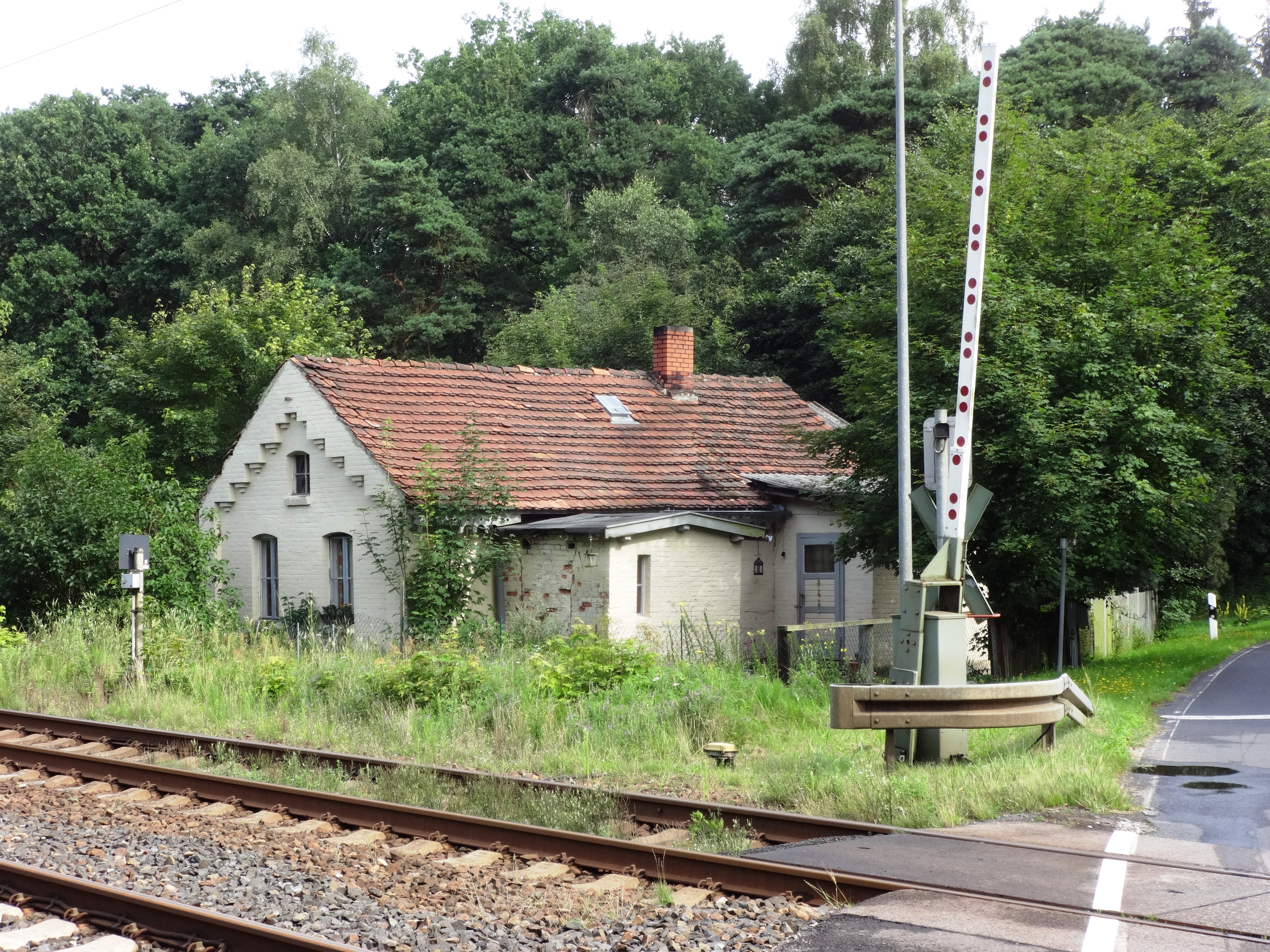 Bahnwärterhaus und Nebengebäude, Jeeser 28 der Gemeinde Sundhagen in Mecklenburg-Vorpommern